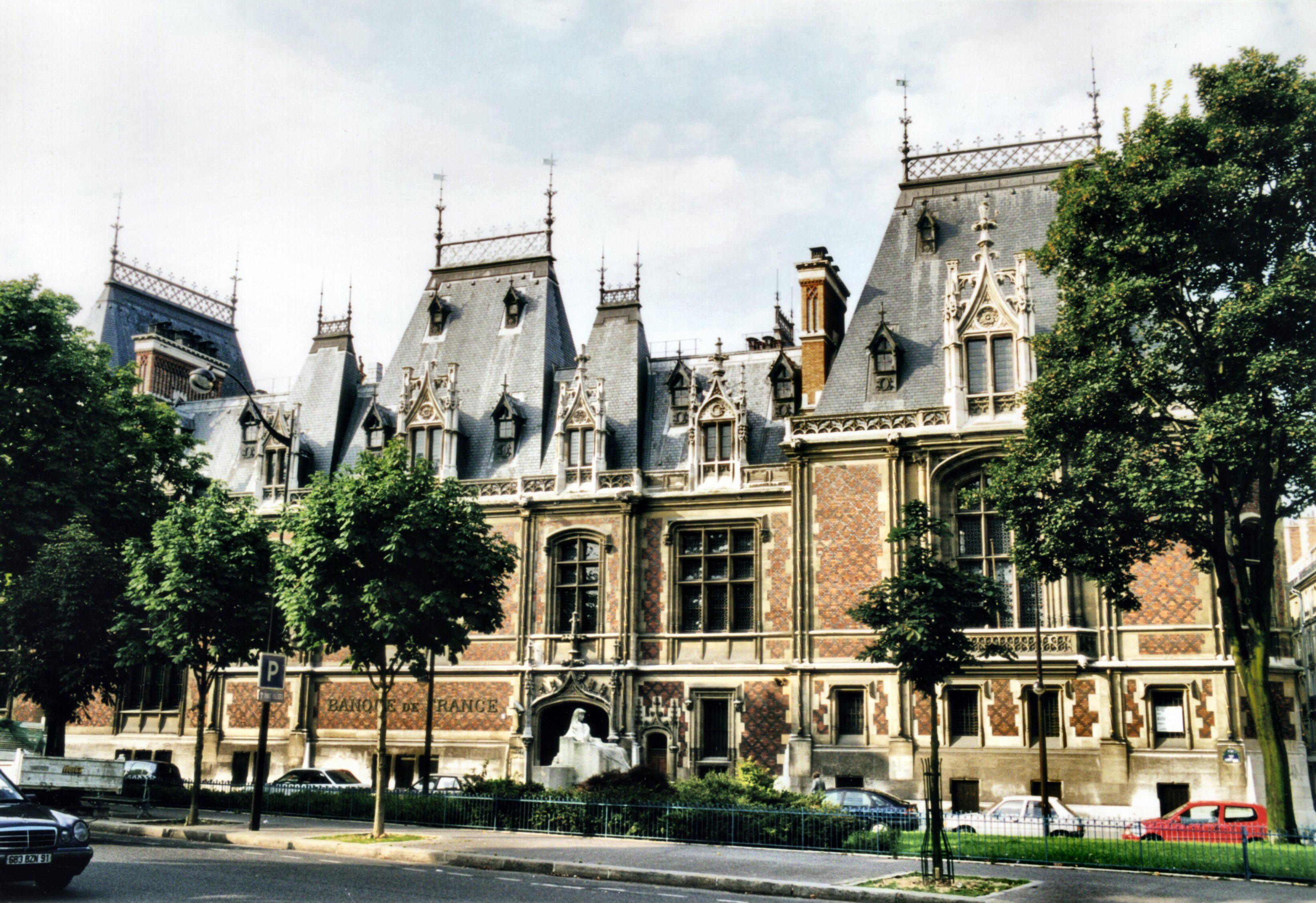 L'Hôtel Gaillard, Place du Général Catroux (Paris), en 2000